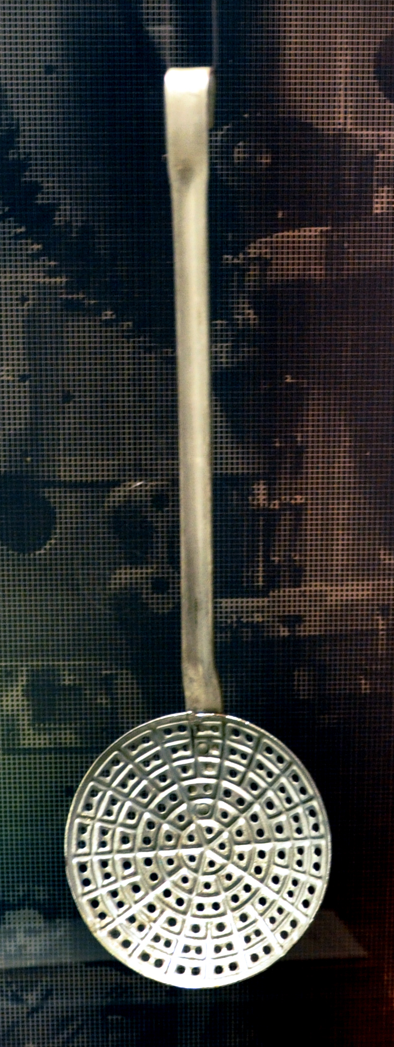 Spätzlessieb aus der Produktion von Müller Weingarten (Umwandlung von Siebeinsätzen von Gasmasken zu einem Haushaltsgegenstand unmittelbar nach dem 2. Weltkrieg); Wirtschaftsmuseum Ravensburg Wirtschaftsmuseum LocationRavensburg, GermanyCoordinates47° 46′ 49″ N, 9° 36′ 55″ E Established28 October 2012Web page control : Q2585923